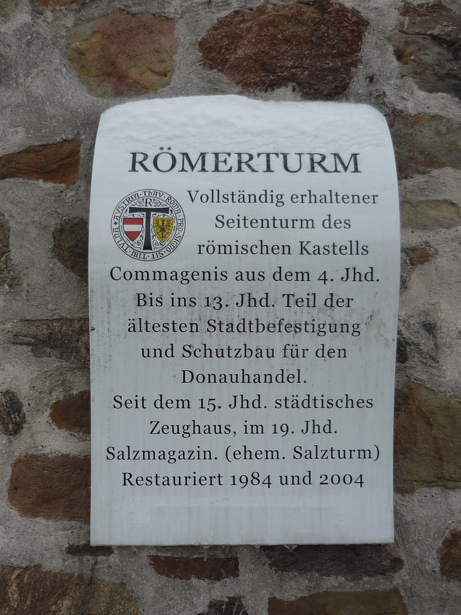 Tullner Informationstafel angebracht am Salzturm